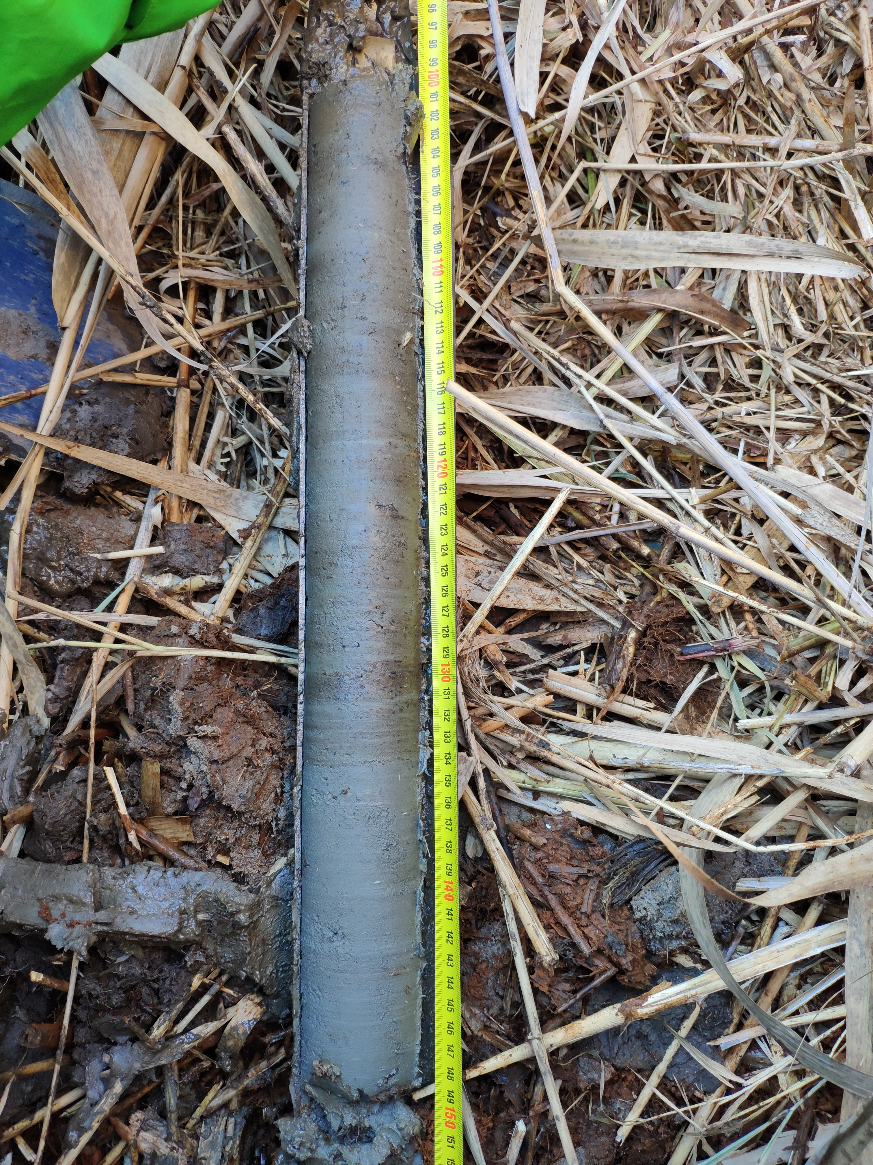 Osad biogeniczny pobrany z głębokości 150cm z paleomeandra w dolinie Odry przy Oławie, bezpośrednio po wydobyciu świdra z podłoża. W skład osadu wchodzi torf trzcinowy (kolor brązowy) i gytia węglanowa (kolor szary).